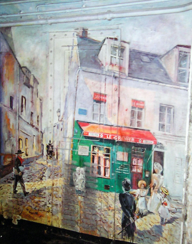 Métro, Paris - Denfert-Rochereau